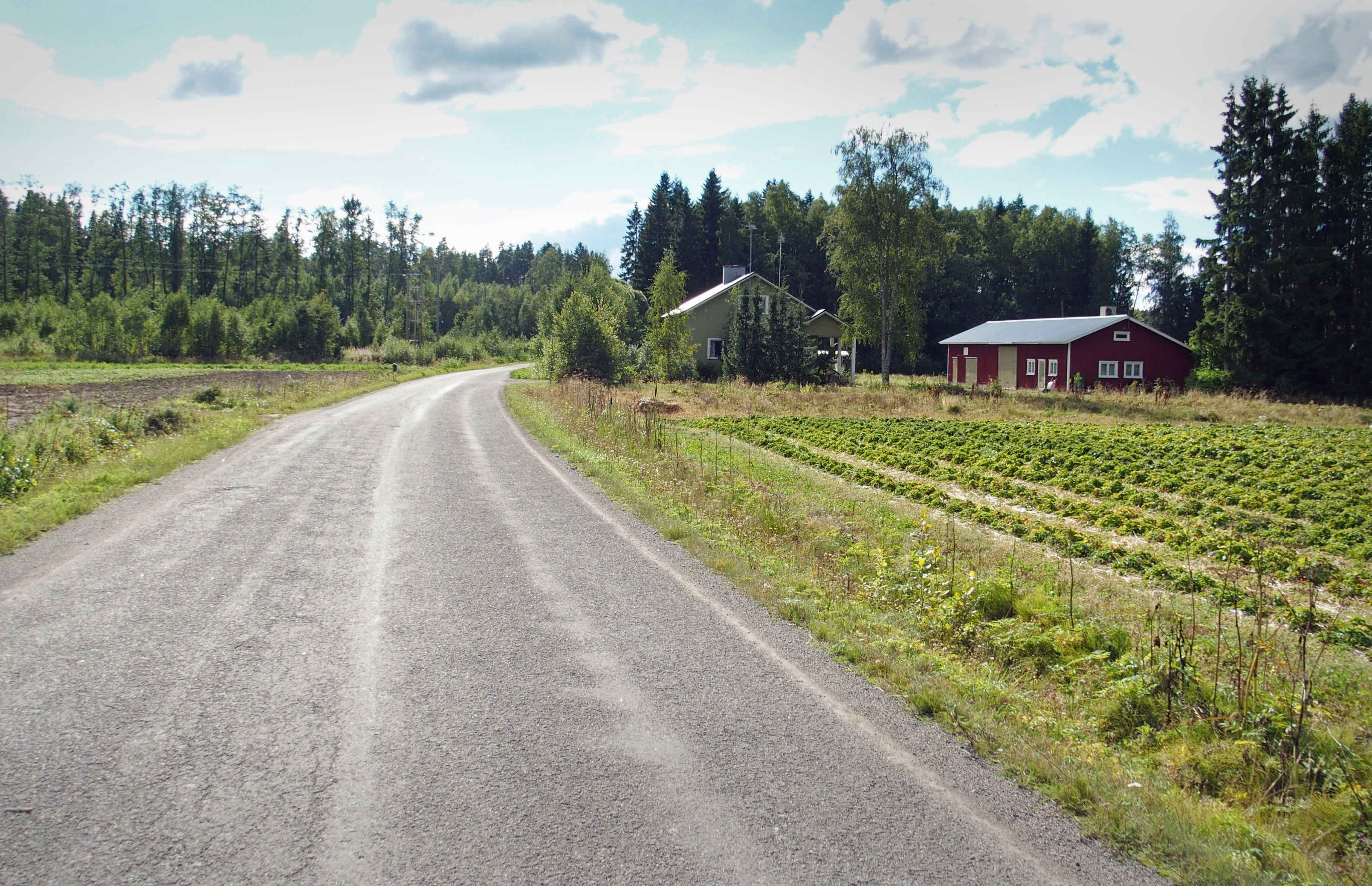 Kulkkilan kylänraittia Sääksjärven etelärannalla Kokemäellä.